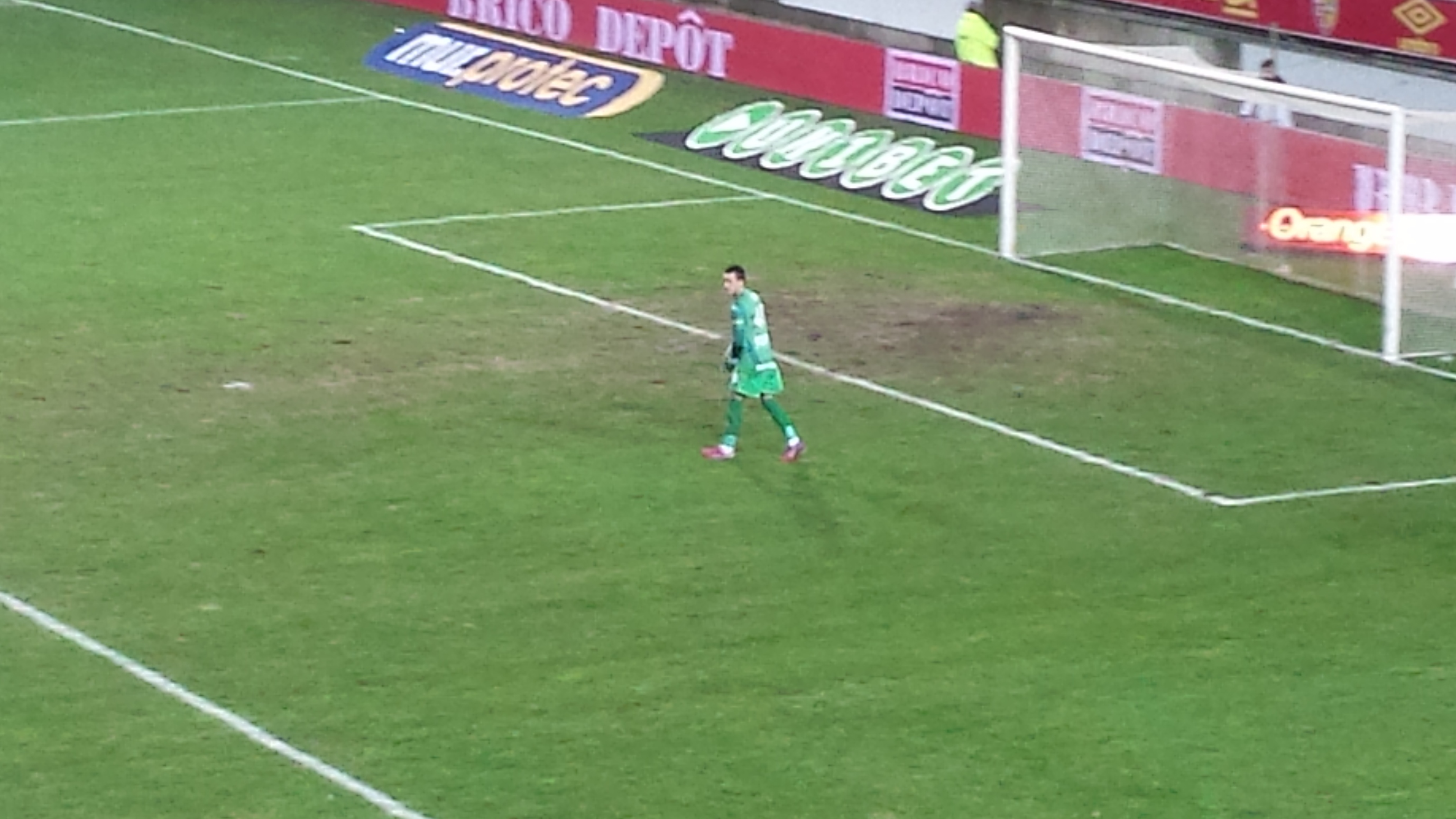 Benjamin Leroy pendant le match Lens - Evian TG, au Stade de la Licorne, match comptant pour la vingt-cinquième journée du championnat de France de football de Ligue 1 2014-2015, le 14 février 2015.